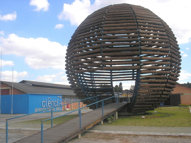 Parque da Ciência Newton Freire Maia, em Pinhais, Grande Curitiba, Paraná, Sul do Brasil.